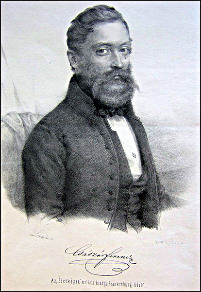 Kolgyári Császár Ferenc (Zalaegerszeg, 1807. július 9. – Kerepes, 1858. augusztus 17.) jogász, költő, bencés szerzetes, a Magyar Tudományos Akadémia tagja.